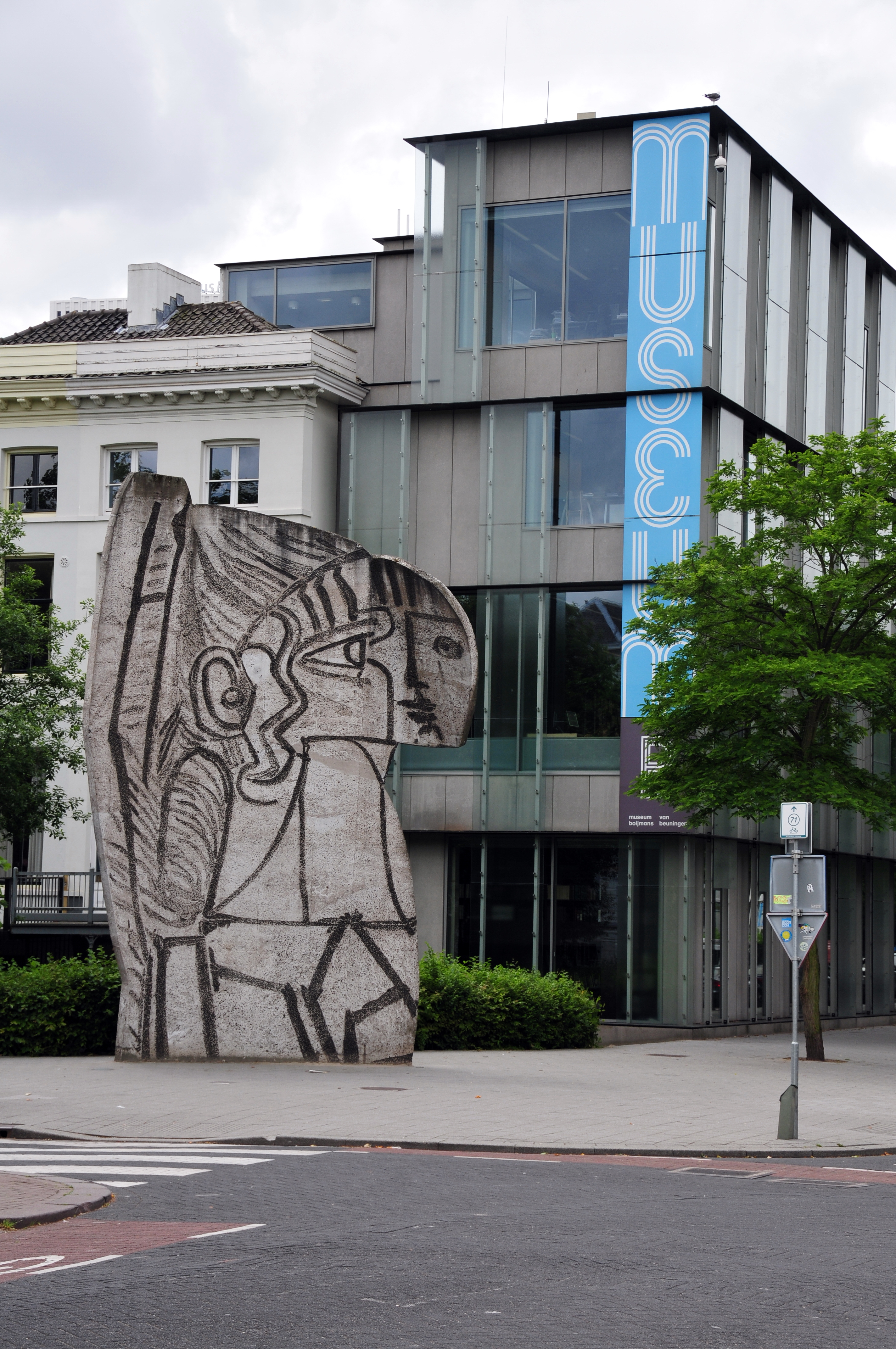 Rotterdam, Niederlande, 2013